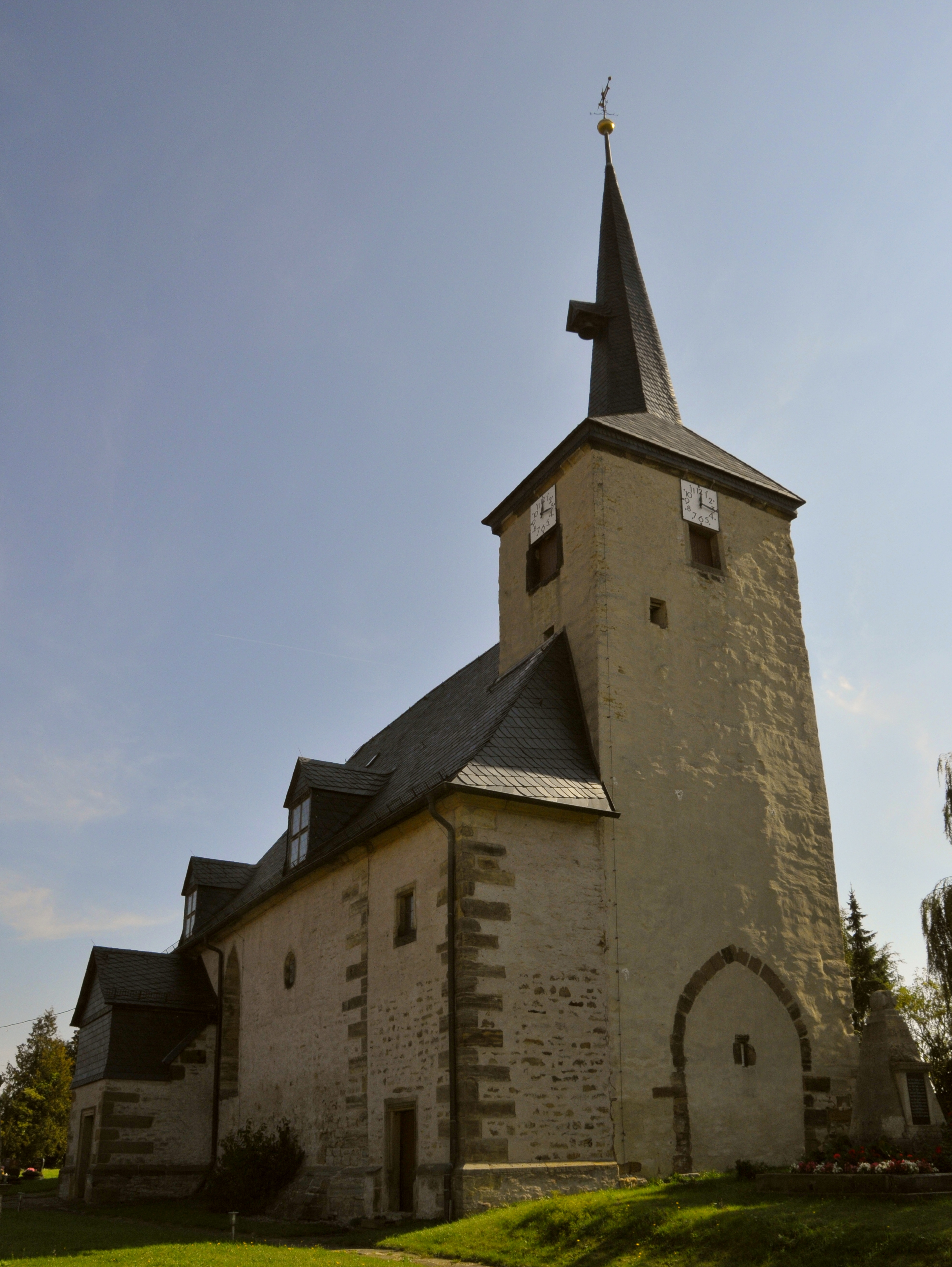 Tröchtelborn, Kirche